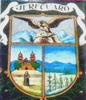 Escudo de Jerécuaro